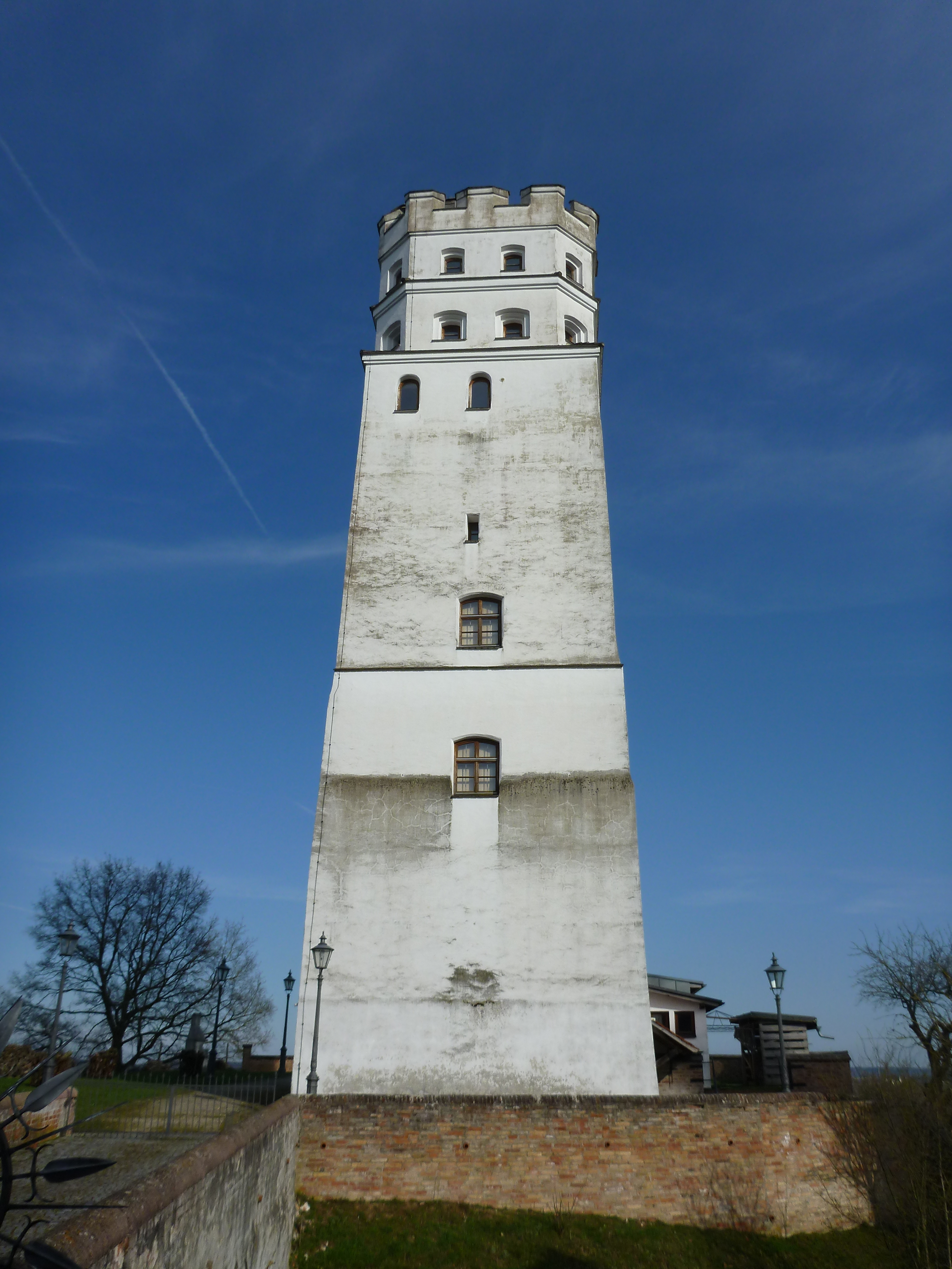 Ehem. Burg, später Fuggerschloss; sog. Hintere (östliche) Burg: Bergfried, sechsgeschossiger, quadratischer, sich nach oben verjüngender Turm mit oktogonalem Aufsatz und Zinnenkranz, im Kern 2. Hälfte 16. Jahrhundert, Aufbau 1. Hälfte 17. Jahrhundert